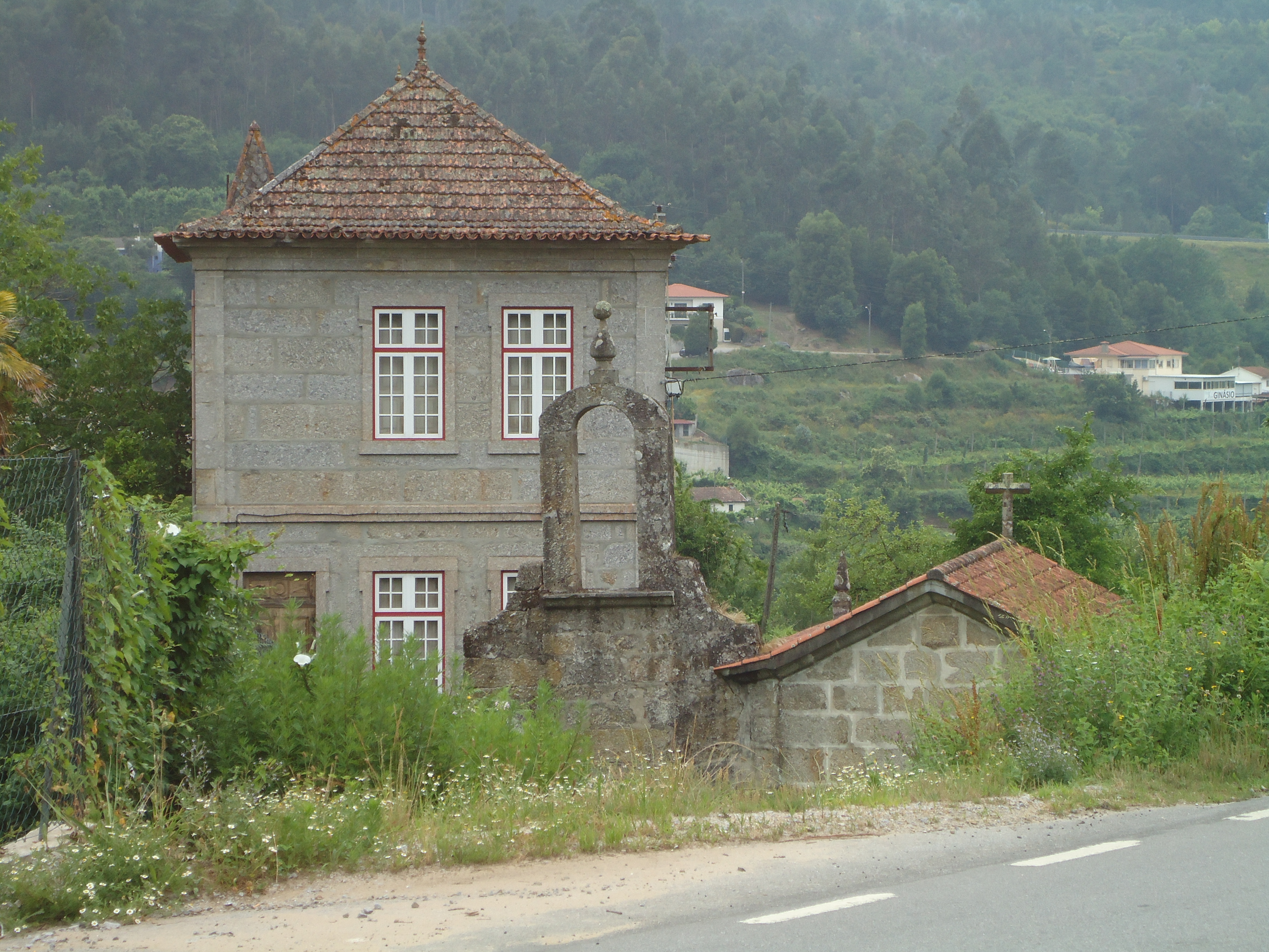 Guimarães, Serzedo, Casas Antigas